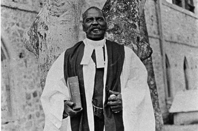 Alexander Bedward